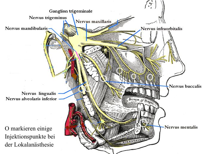 Modified from File:Mandibularis.gif Image:Gray778.png, nachbearbeitet und Beschriftung modifiziert (Deutsch/german) von Benutzer:Partynia